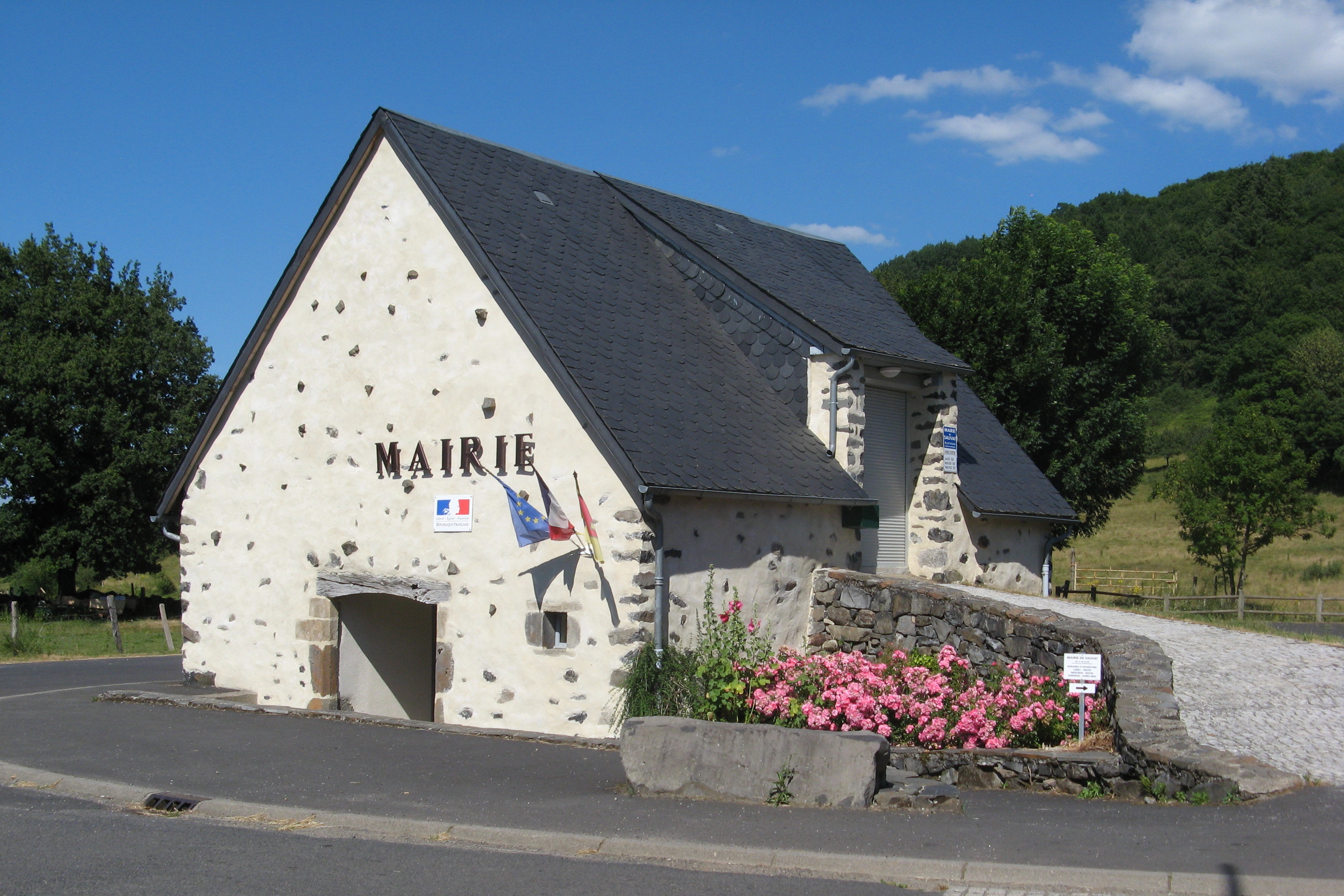 Sauvat, mairie